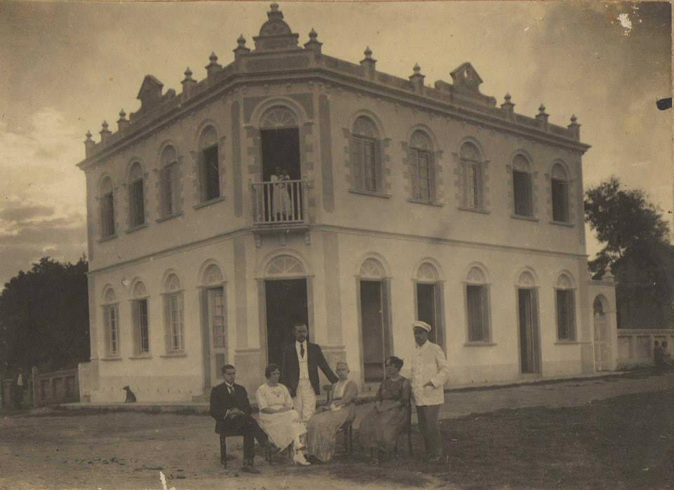 Casa da Família Sandrini, acervos de Edison Westphal e Enerson Harger